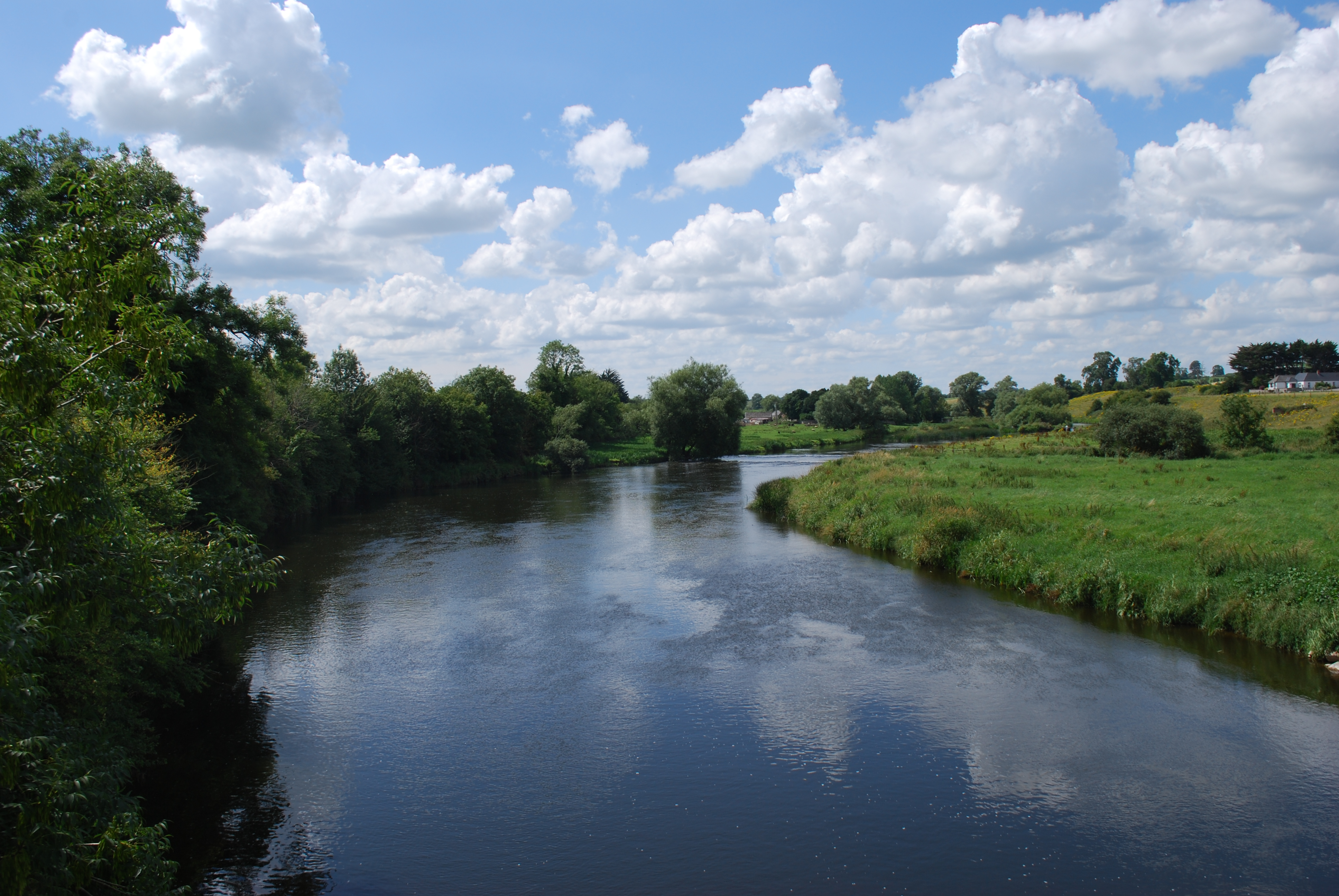 Vue de Bru na Boinne.